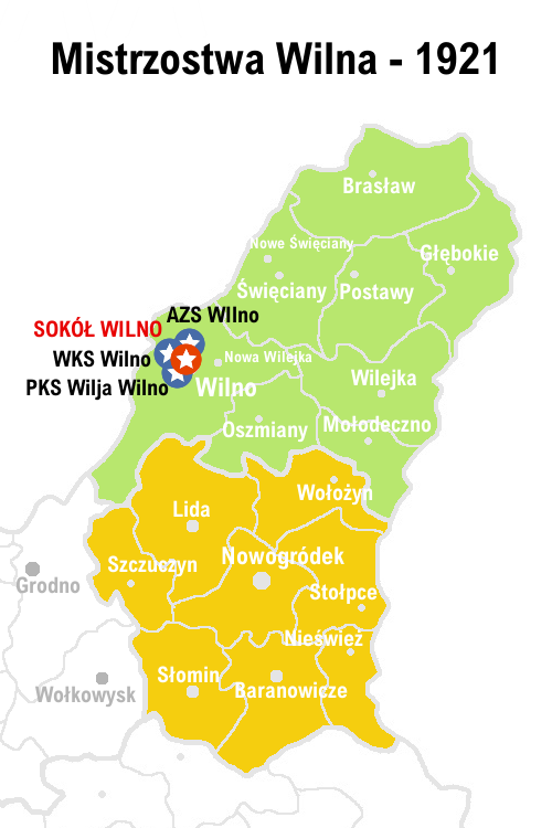 Rozgrywki w piłce nożnej w Wileńskim OZPN w 1921 roku